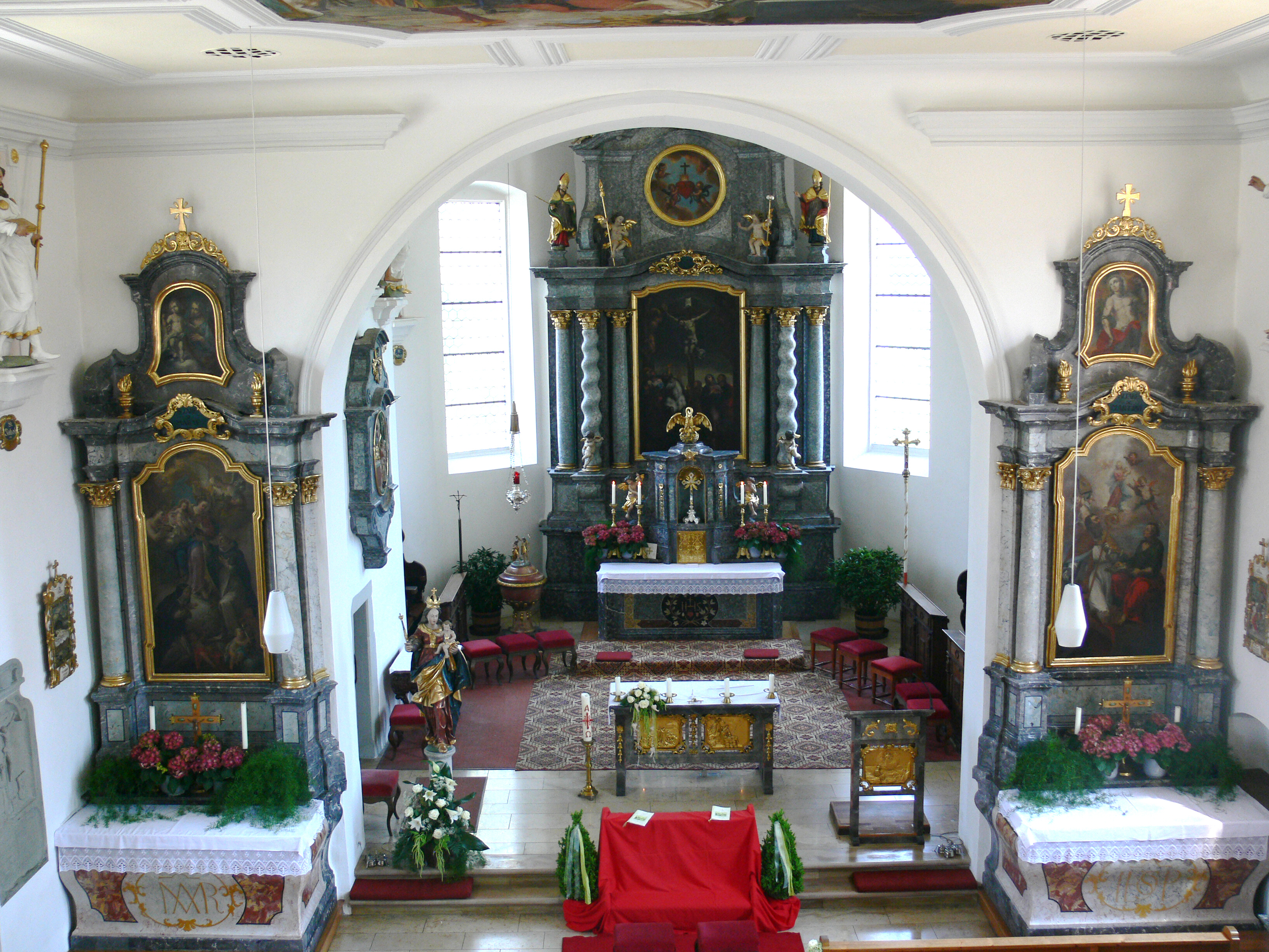 Hergensweiler, Landkreis Lindau Pfarrkirche St. Ambrosius, Blick von der Empore auf den Chor mit Hochaltar und die beiden Seitenaltäre